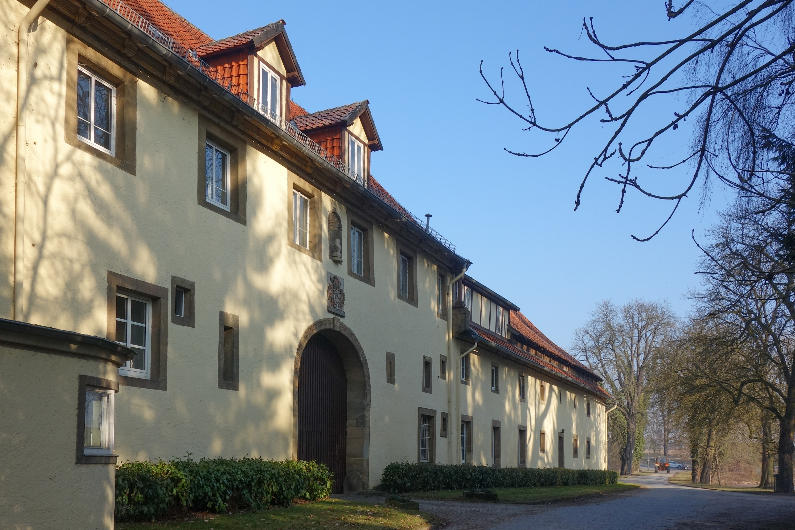 Gutsgebäude von Söderhof (Gemeinde Haverlah